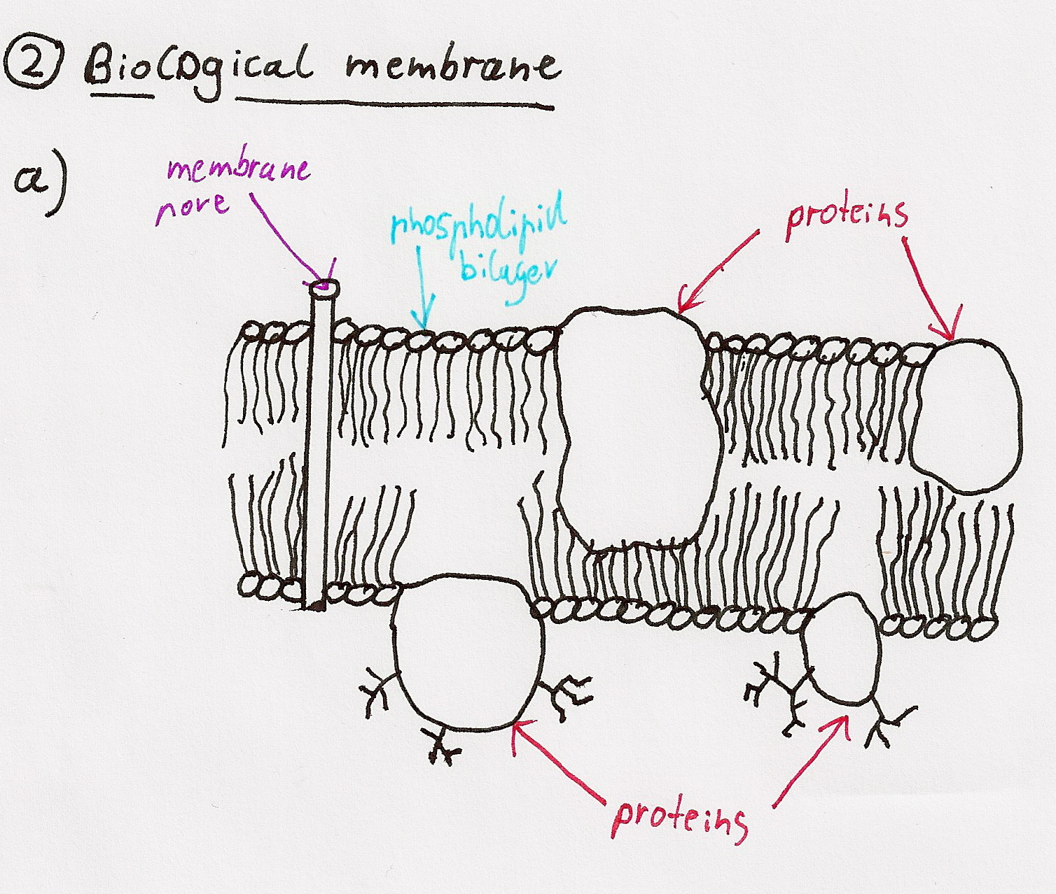 Cell membrane